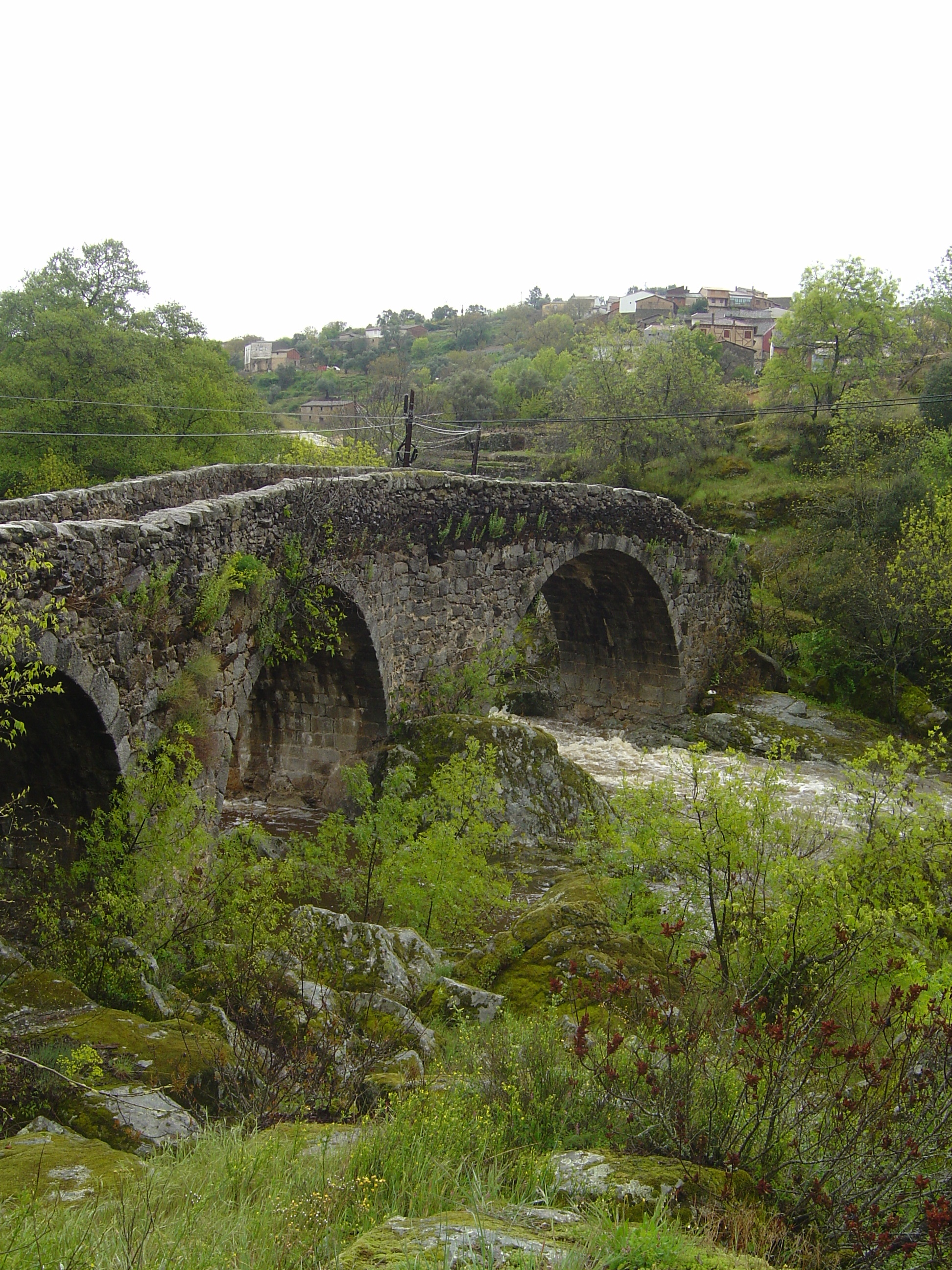 Puente sobre el río Alagón, San Esteban de la Sierra, Salamanca, Espana.